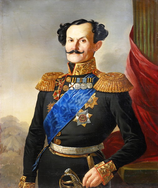 Портрет Г.Е.Шварца. Курская государственная картинная галерея им. А.Дейнеки